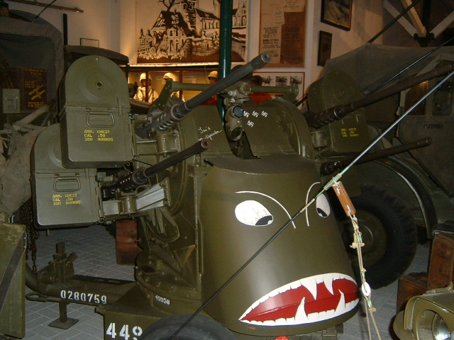 Geschütz (US) 2. Weltkrieg im National Museum of Military History in Diekirch in Luxembourg (Luxembourg)